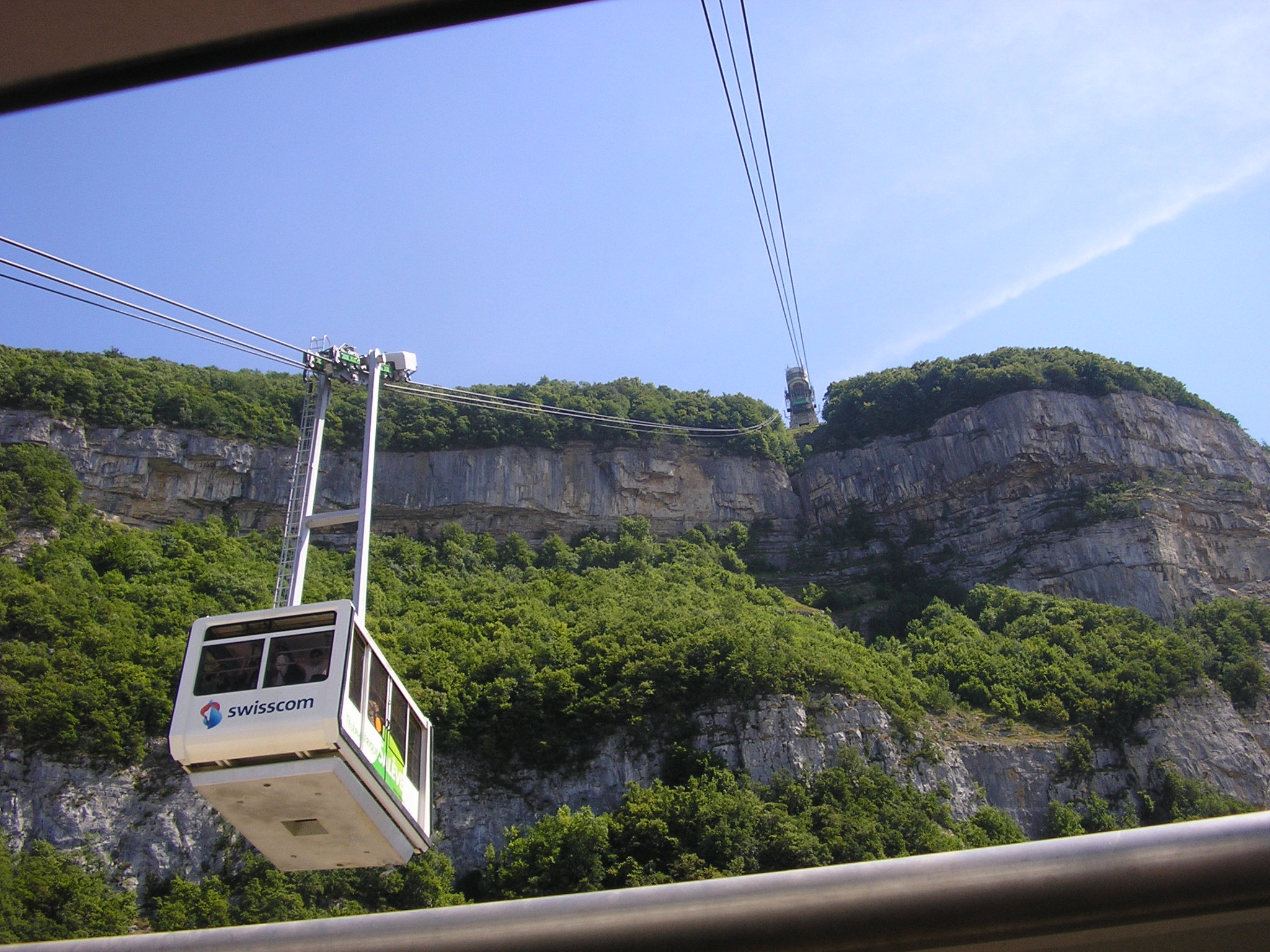 Téléphérique du Salève, croisement des cabines à mi-chemin.